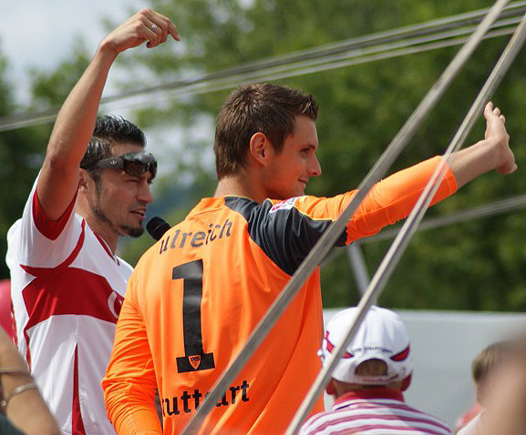 VfB Opening 2010